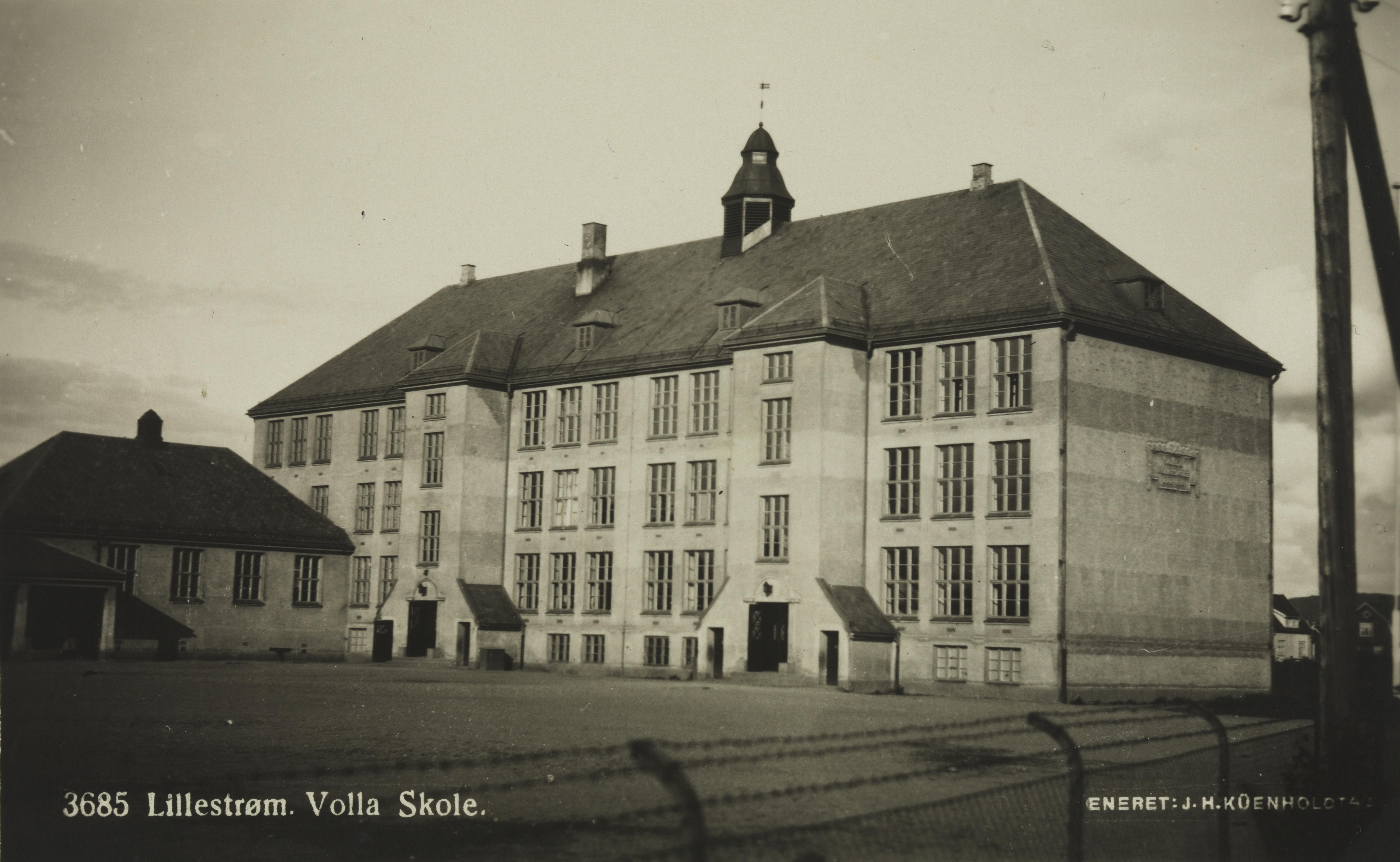 Bildet er hentet fra Nasjonalbibliotekets bildesamling Lillestrøm,Volla skole, Skedsmo, Akershus